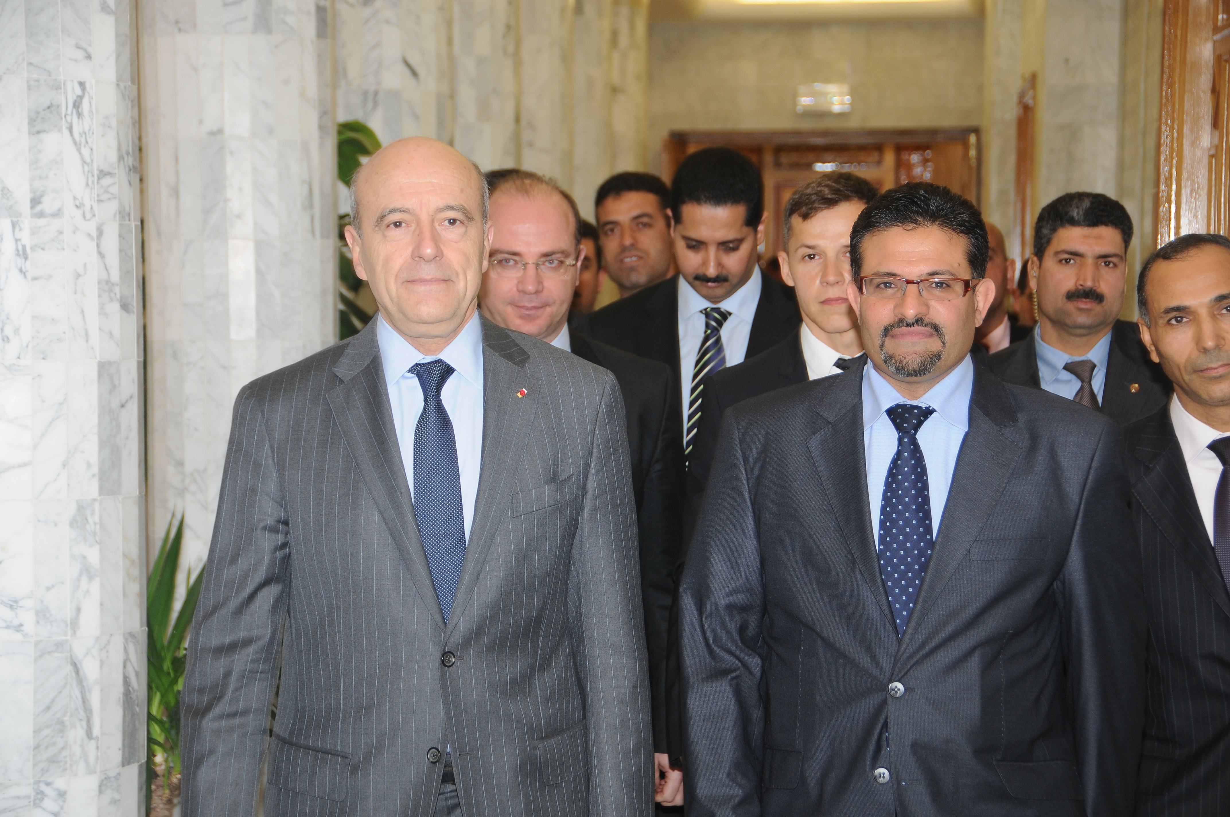 Rafik Abdessalem, ministre tunisien des Affaires étrangères, et Alain Juppé, ministre français des Affaires étrangères et européennes, à Tunis